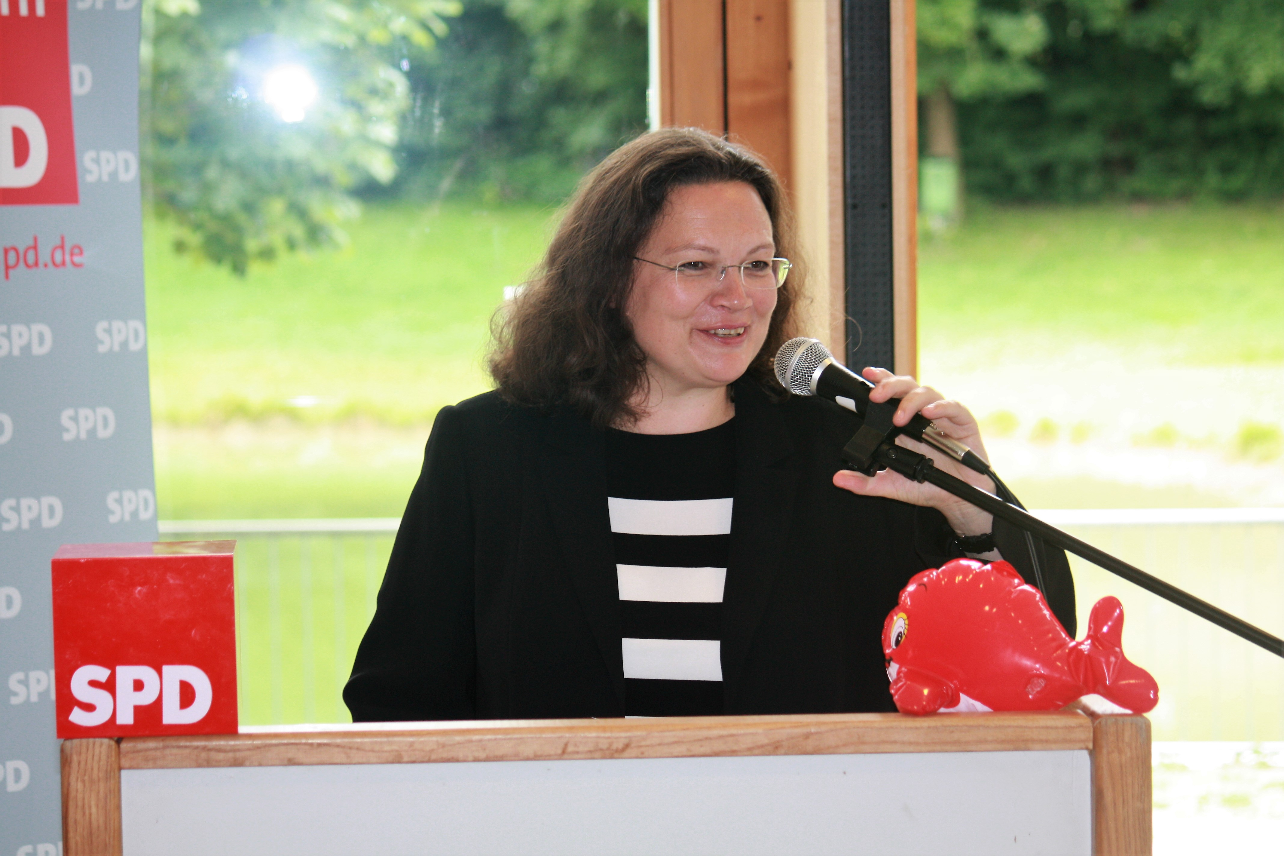 Andrea Nahles bei einer Wahlkampfveranstaltung in Markt Schwaben